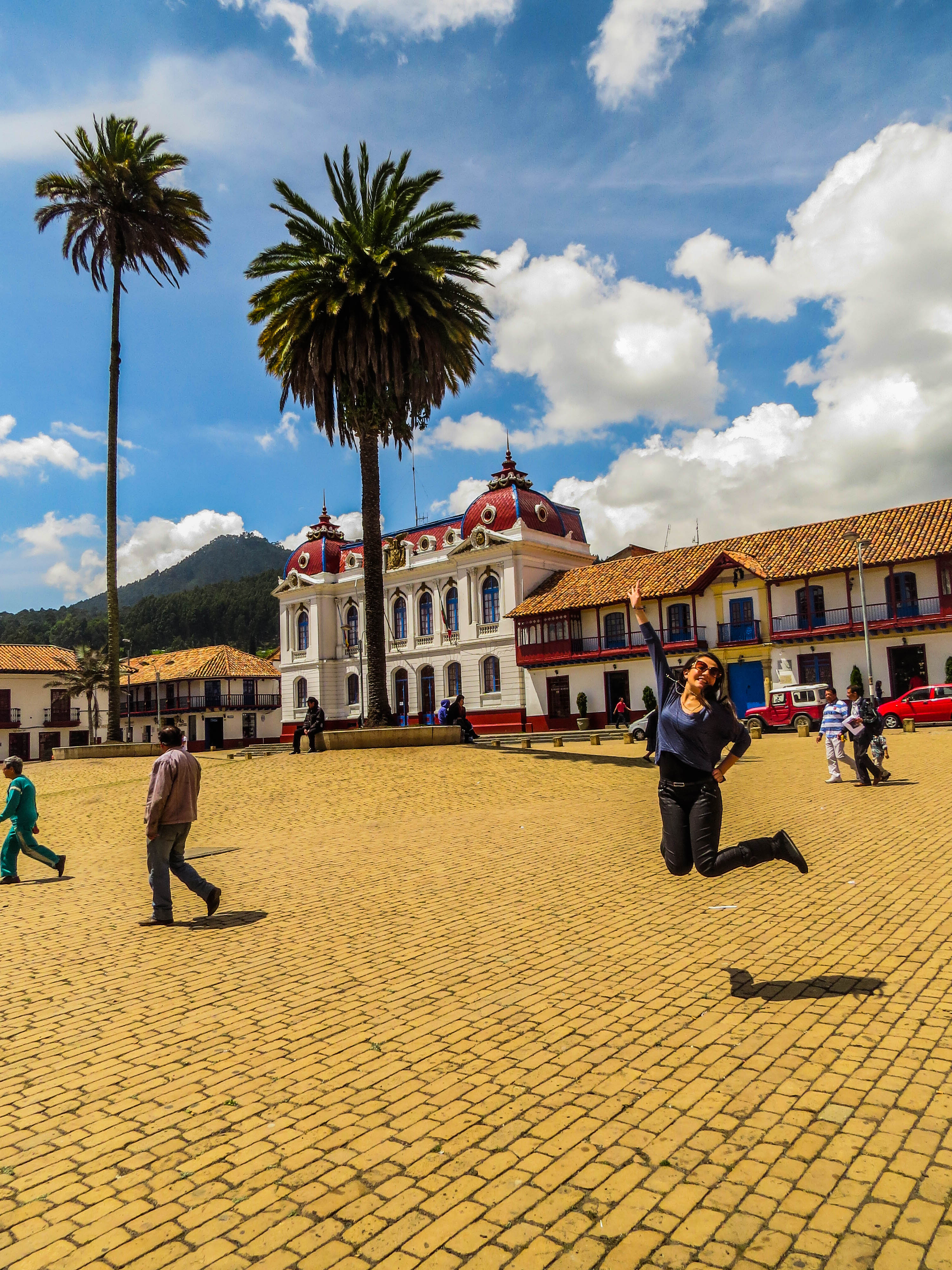 Plaza principal de Zipaquirá.